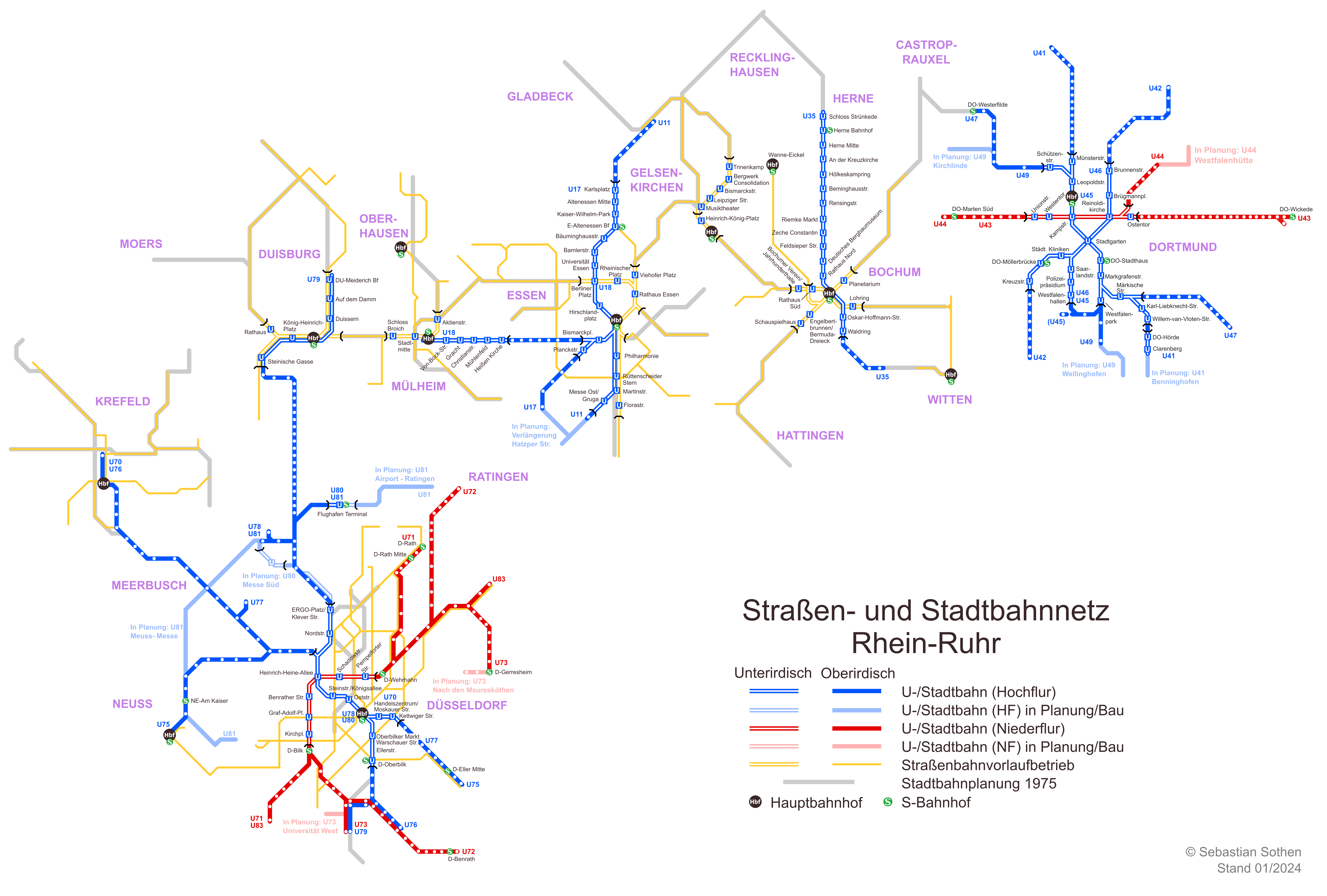 Stadtbahnnetz Rhein-Ruhr